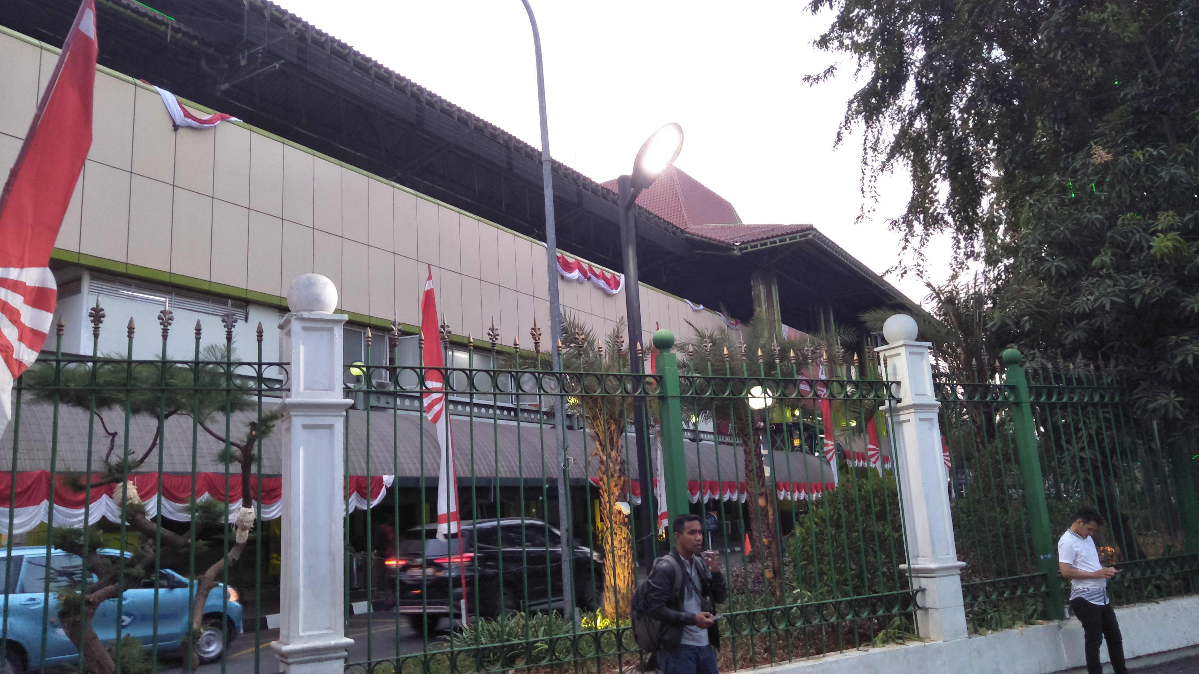 Stasiun Gambir tampak depan